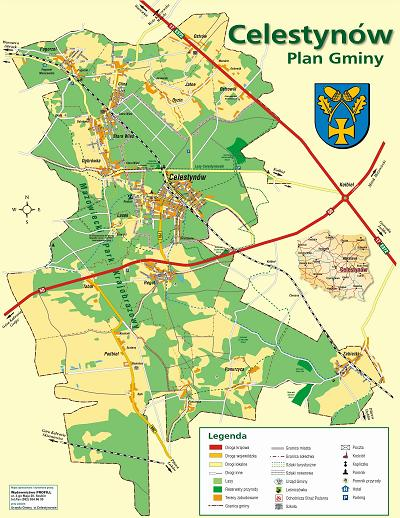 Map